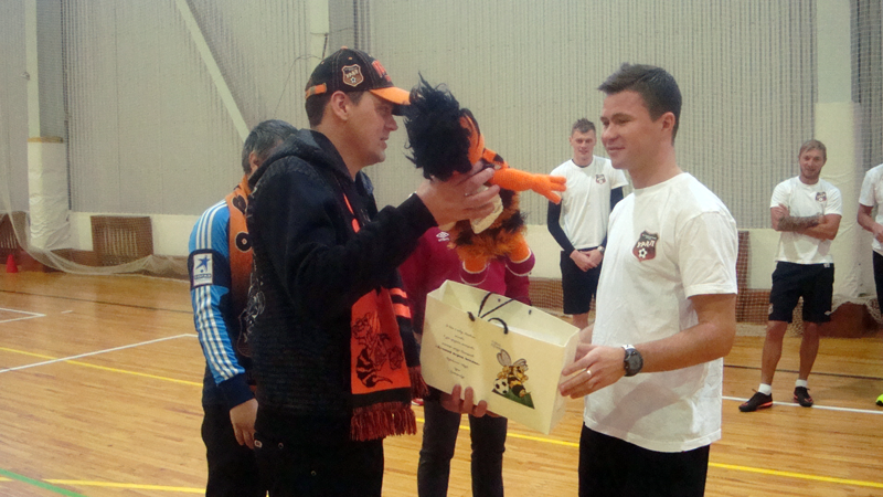 "Шмель" для лучшего игрока ноября-декабря 2015